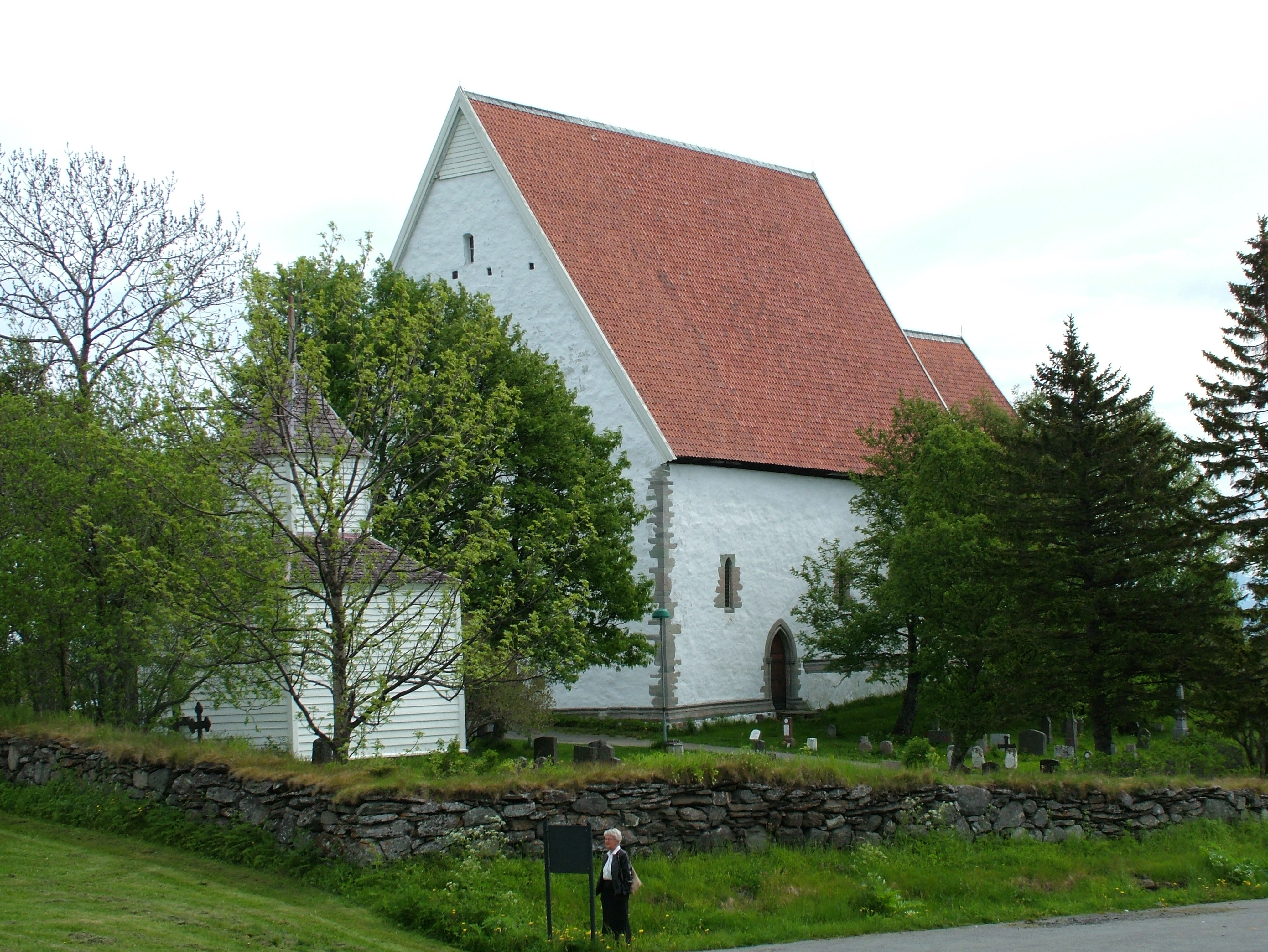 Die Kirche von Trondenes in der Nähe von Harstad.